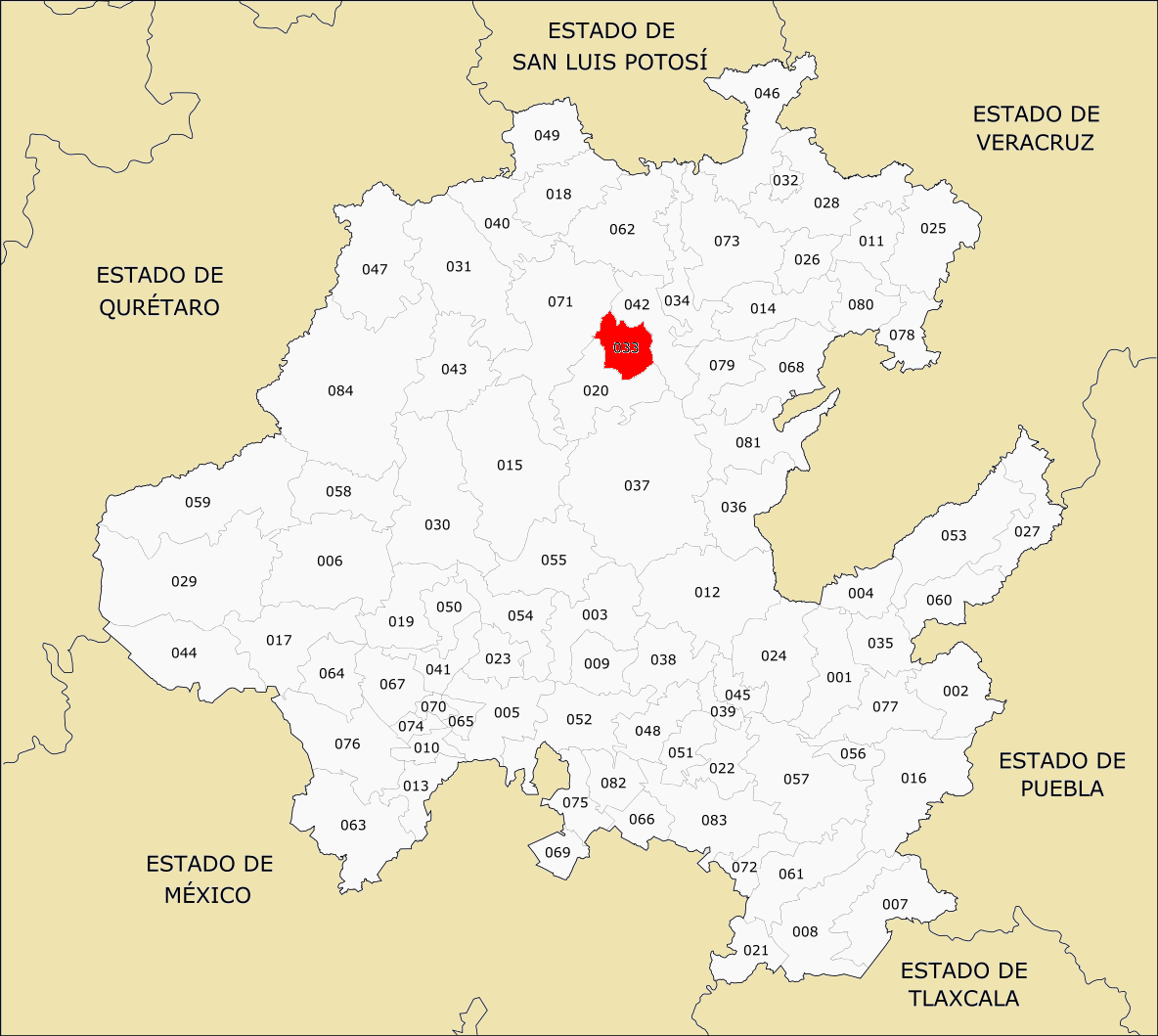 Municipios de Hidalgo